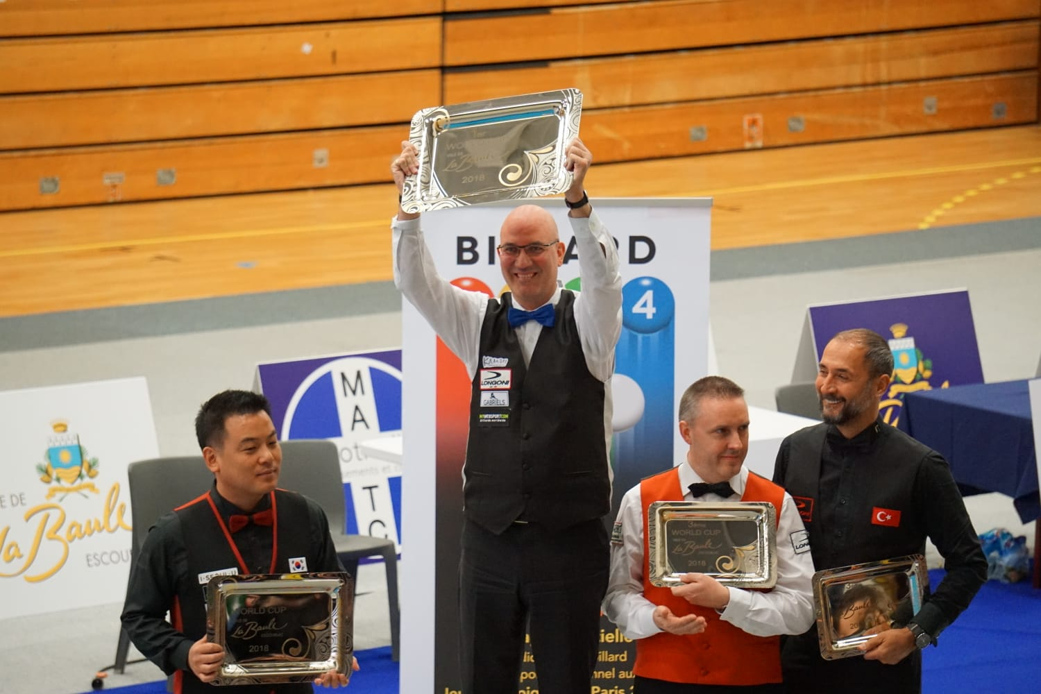 Siegerehrung (vlnr.): Cho Jae-ho (Silber), Martin Horn (Gold), Frédéric Caudron & Semih Saygıner (Bronze)